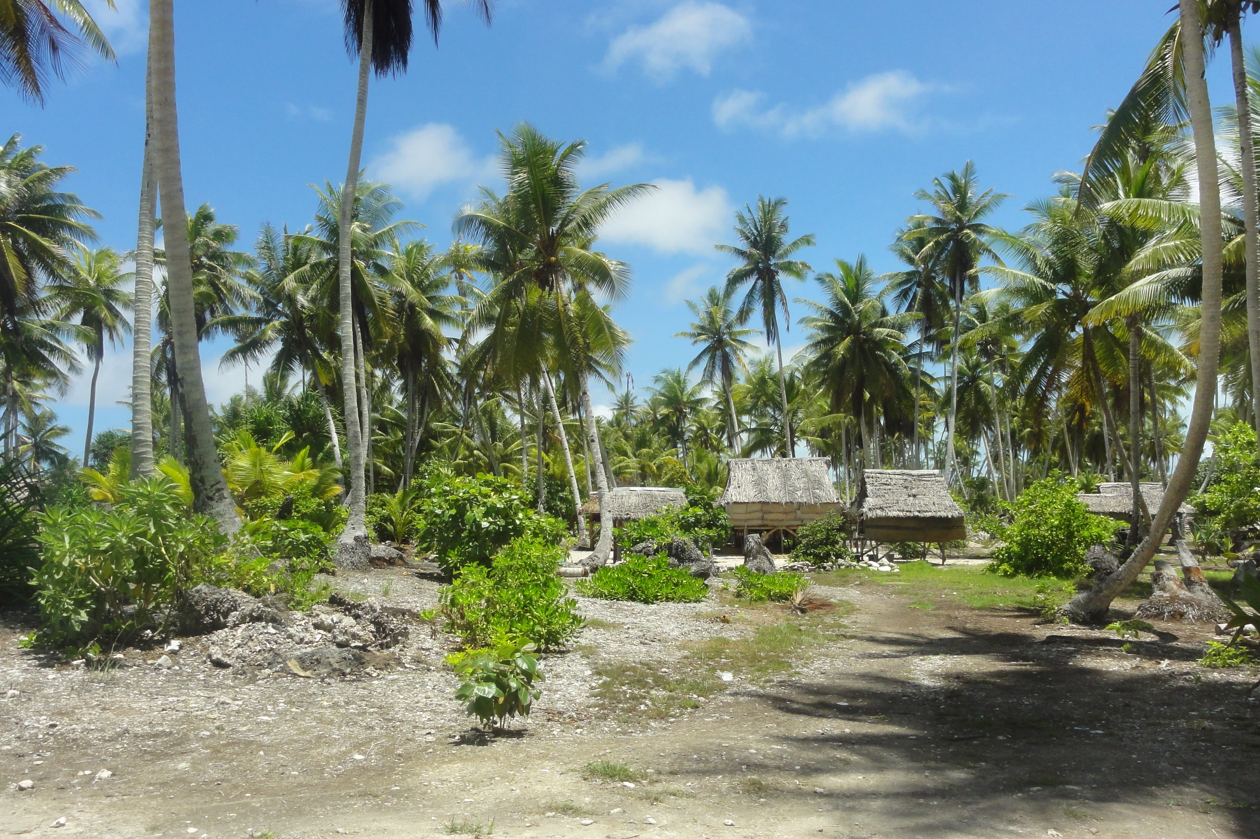 Landscape, Kiribati, 2011.